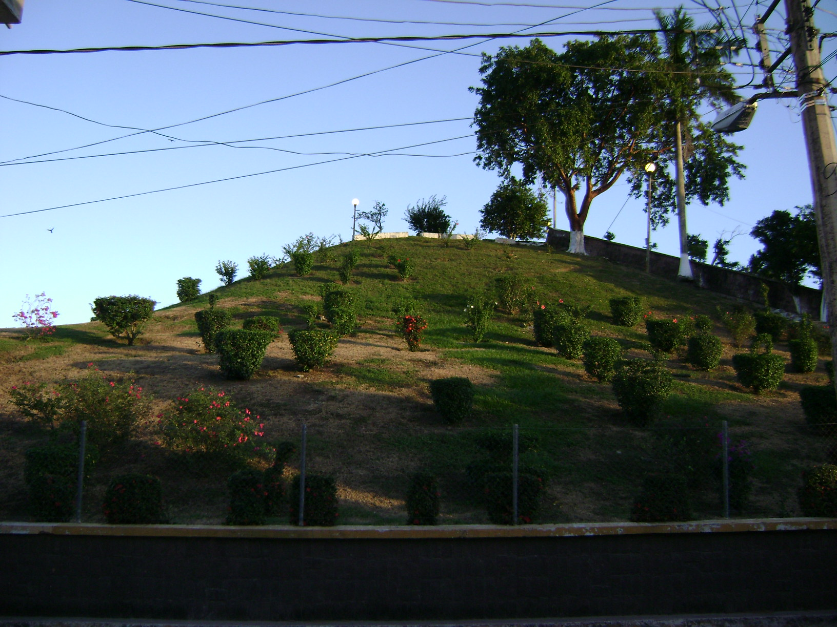 Pirámide maya cubierta por gruesas capas de tierras, conocida como el "Cuyo" ubicado en el centro de Jonuta, Tabasco